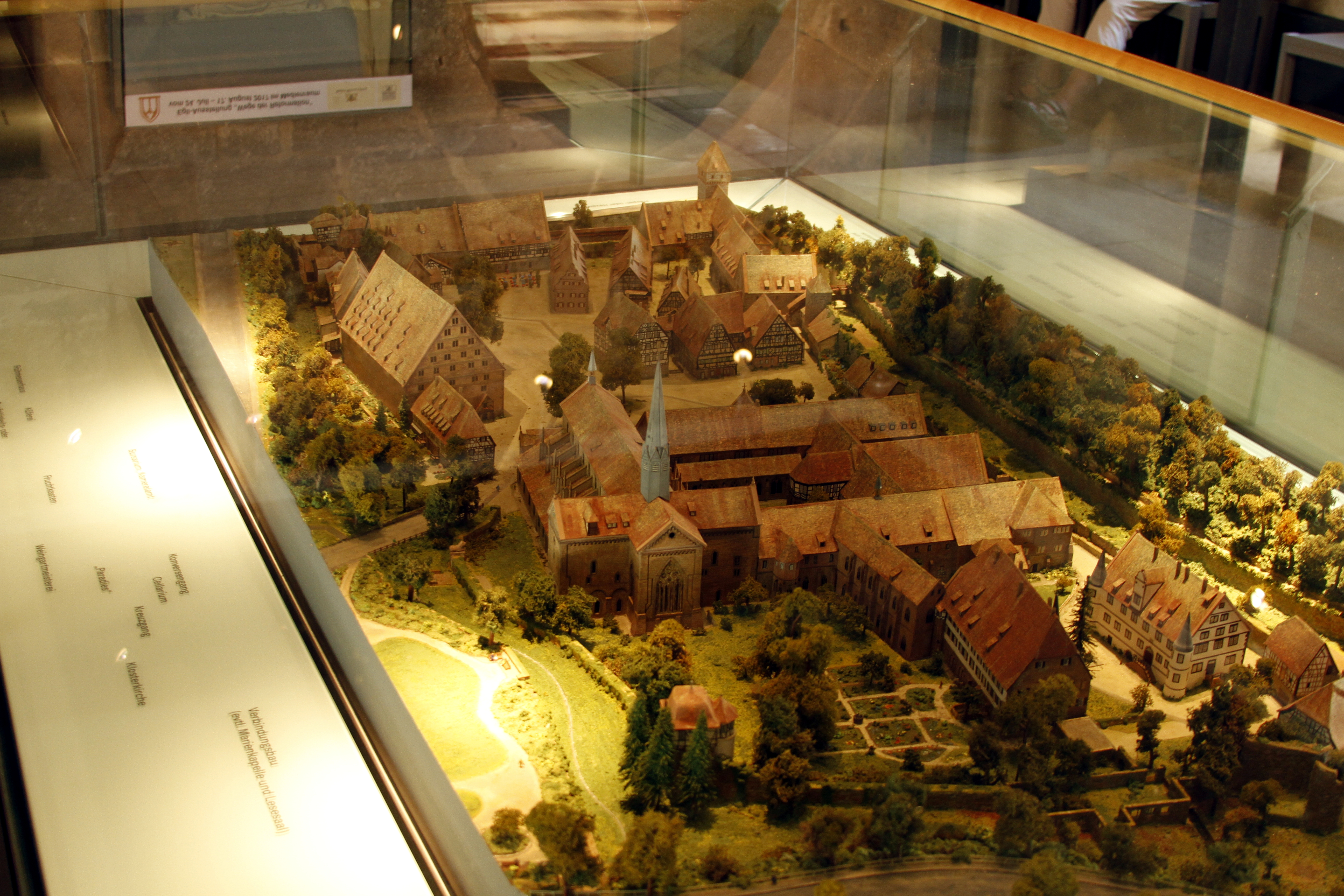 Maulbronn Monastery Complex - Maulbronn - Germany